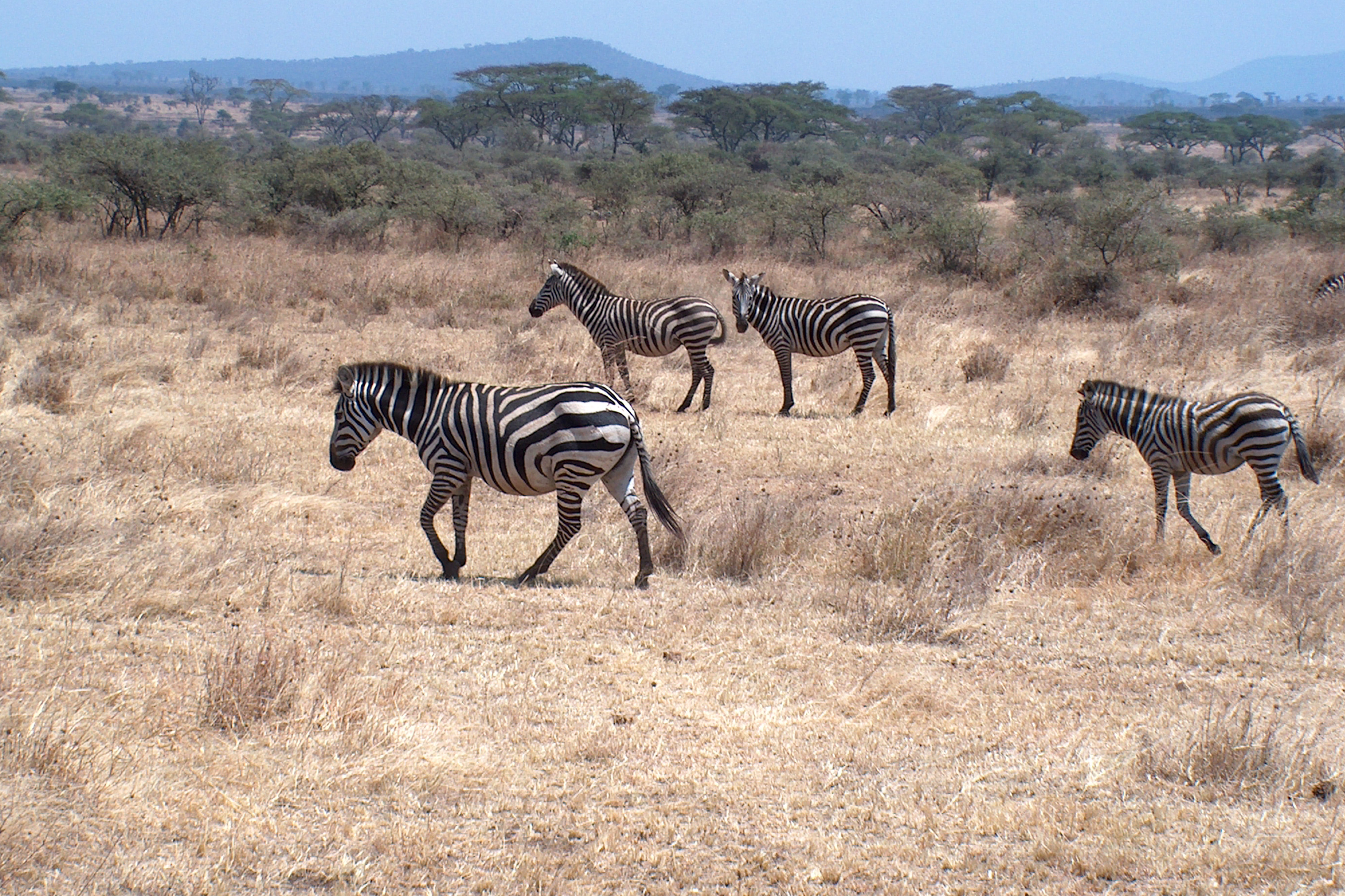 Zebraer